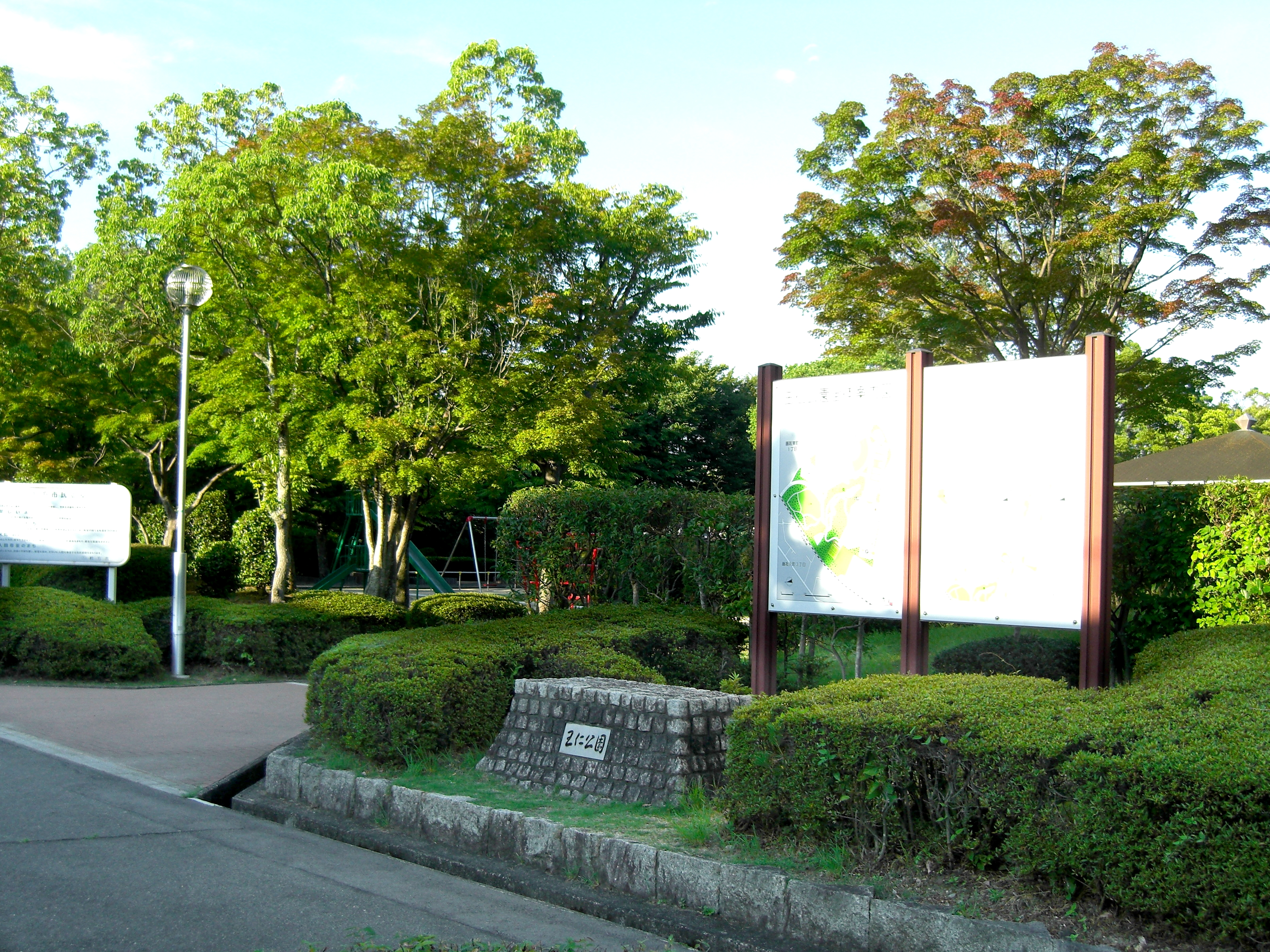 王仁公園入口(大阪府枚方市)